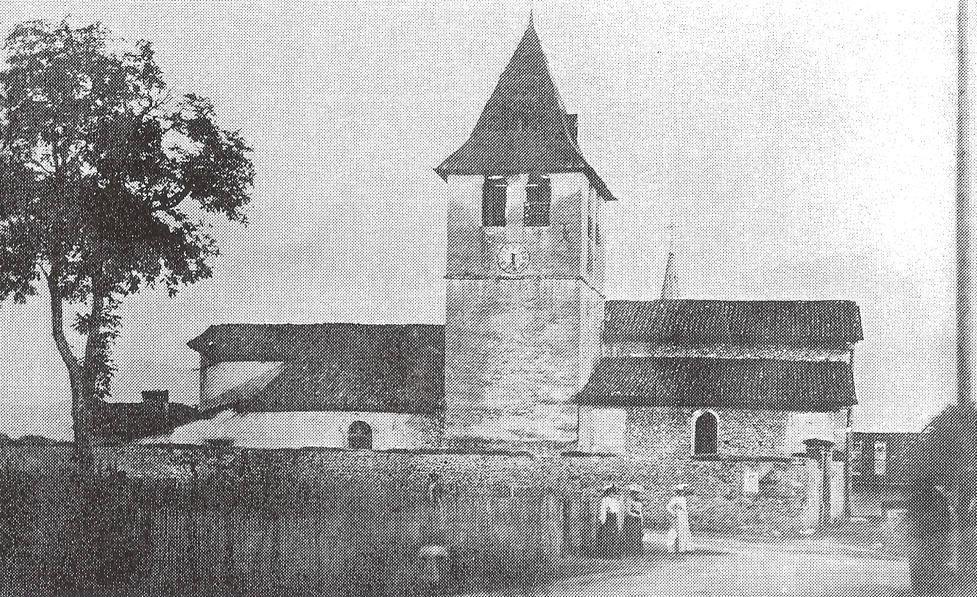 Vue de Rives début du XX° siècle (Le prieuré) / Rives, Isère, France